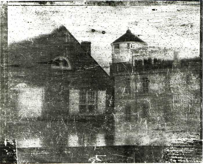 Joseph Saxton. Arsenal and Cupola, Philadelphia Central High School, Sep 25 or Oct 16, 1839 (earliest photo taken in USA)